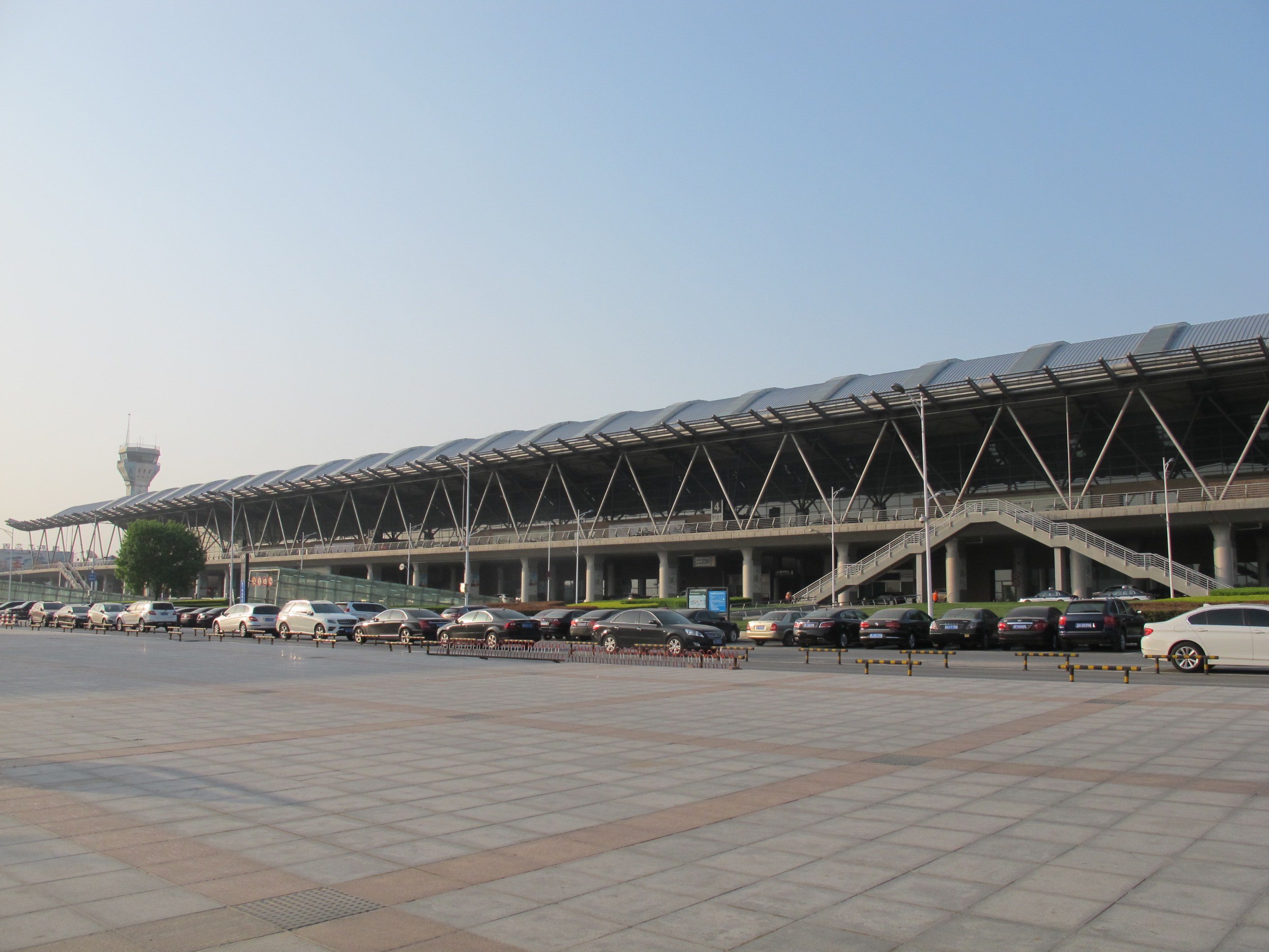 郑州机场侯机楼